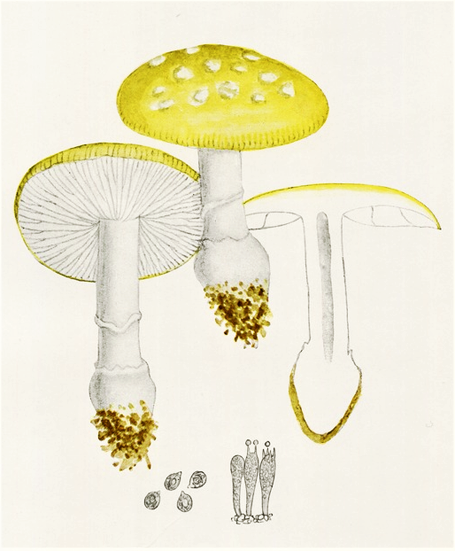 Giacomo Bresadola: Amanita junquillea Quél. (1876), heute Amanita gemmata (Fr., 1838) Bertill. (1866)